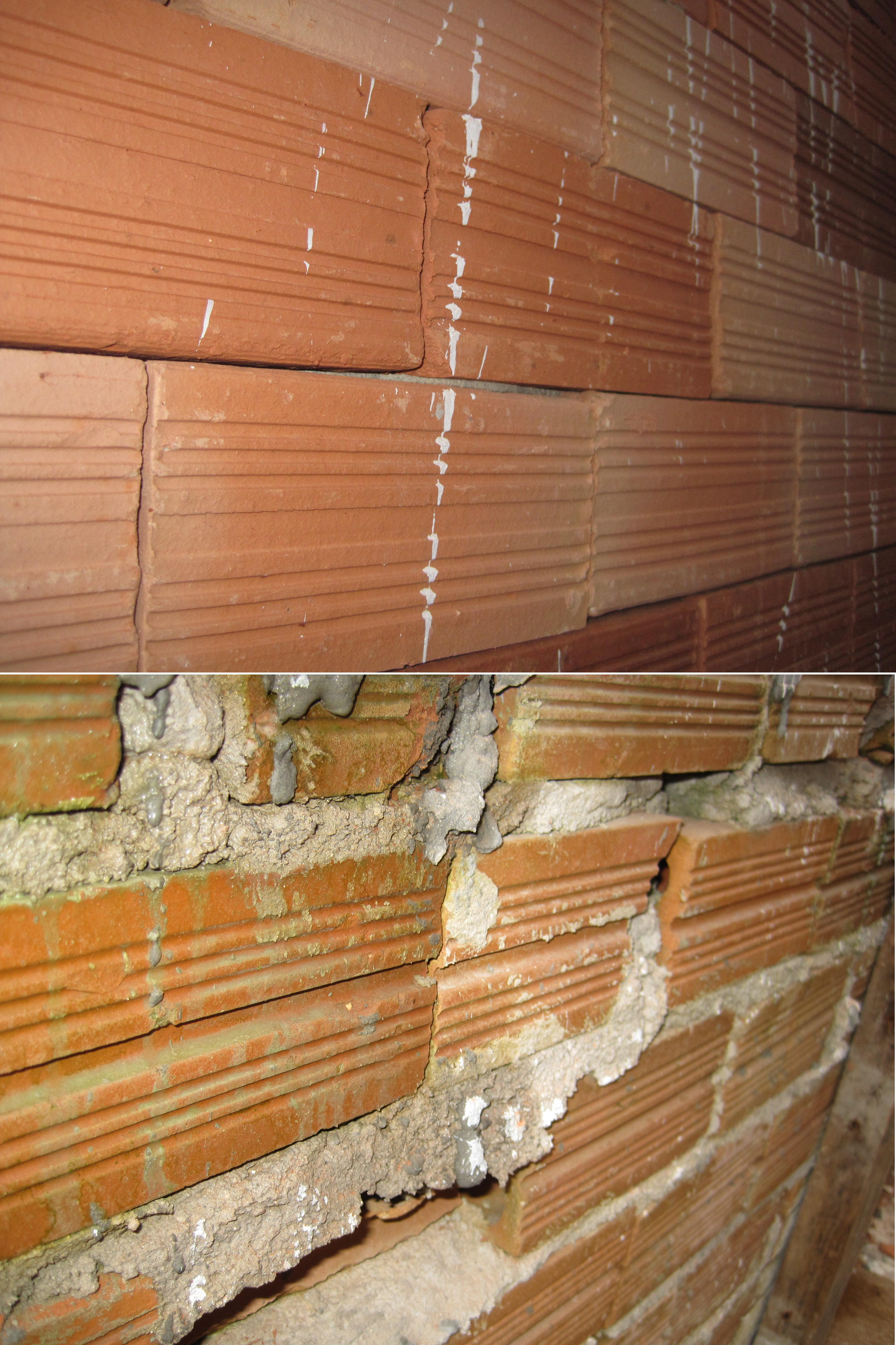 Parede assentada com argamassa polimérica (acima) e parede assentada com argamassa cimantícia (abaixo)